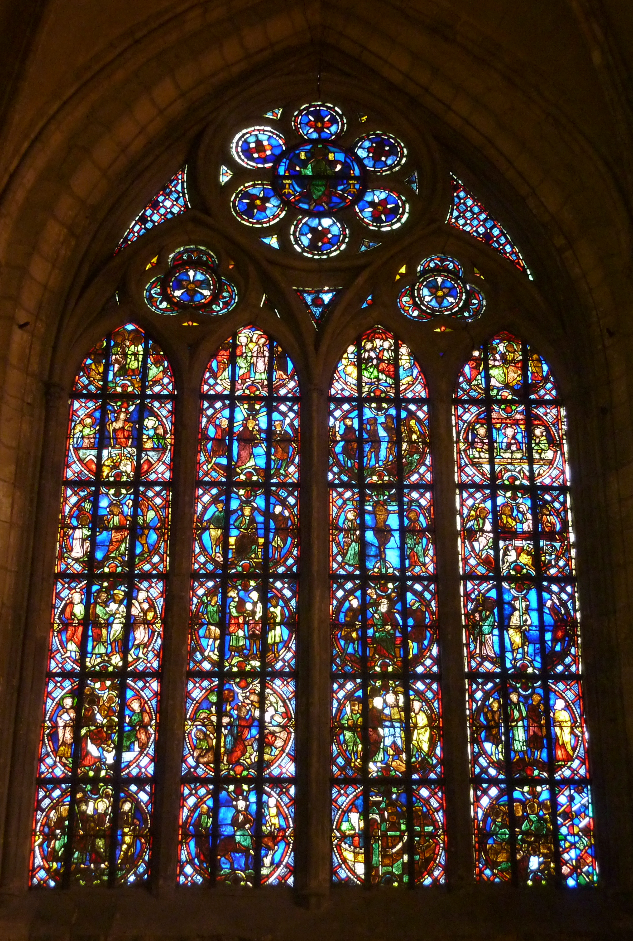 Kirche Sainte-Anne in Gassicourt, einem Stadtteil von Mantes-la-Jolie im Département Yvelines (Île de France), Chorfenster, Bleiglasfenster aus der zweiten Hälfte des 13. Jahrhunderts; Darstellung: Szenen der Passion und der Auferstehung Christi